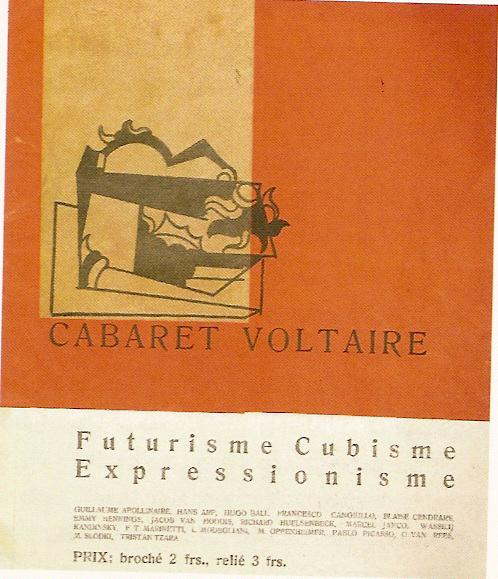 Cabaret Voltaire est le nom de la première publication zurichoise du futur groupe Dada.